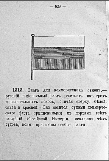 Статья 1313 Морского устава Российской империи 1899 года и прилагающееся к ней чёрно-белое изображение бело-сине-красного флага